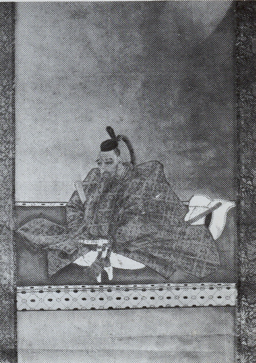 相良頼徳の肖像(モノクロ)。